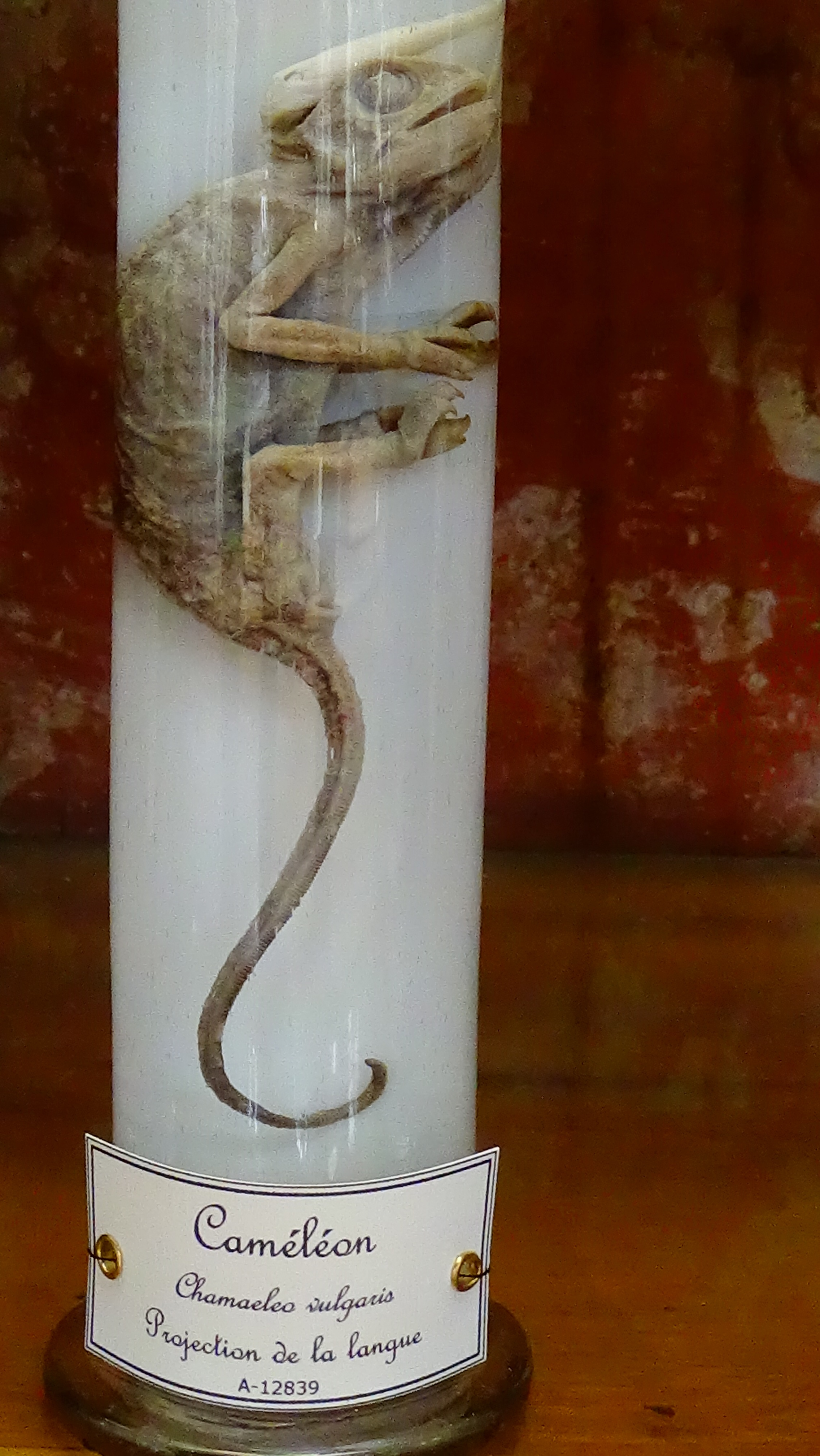 Chamaeleo chamaeleon - Chamaeleo vulgaris - projection de la langue - mnhn Paris